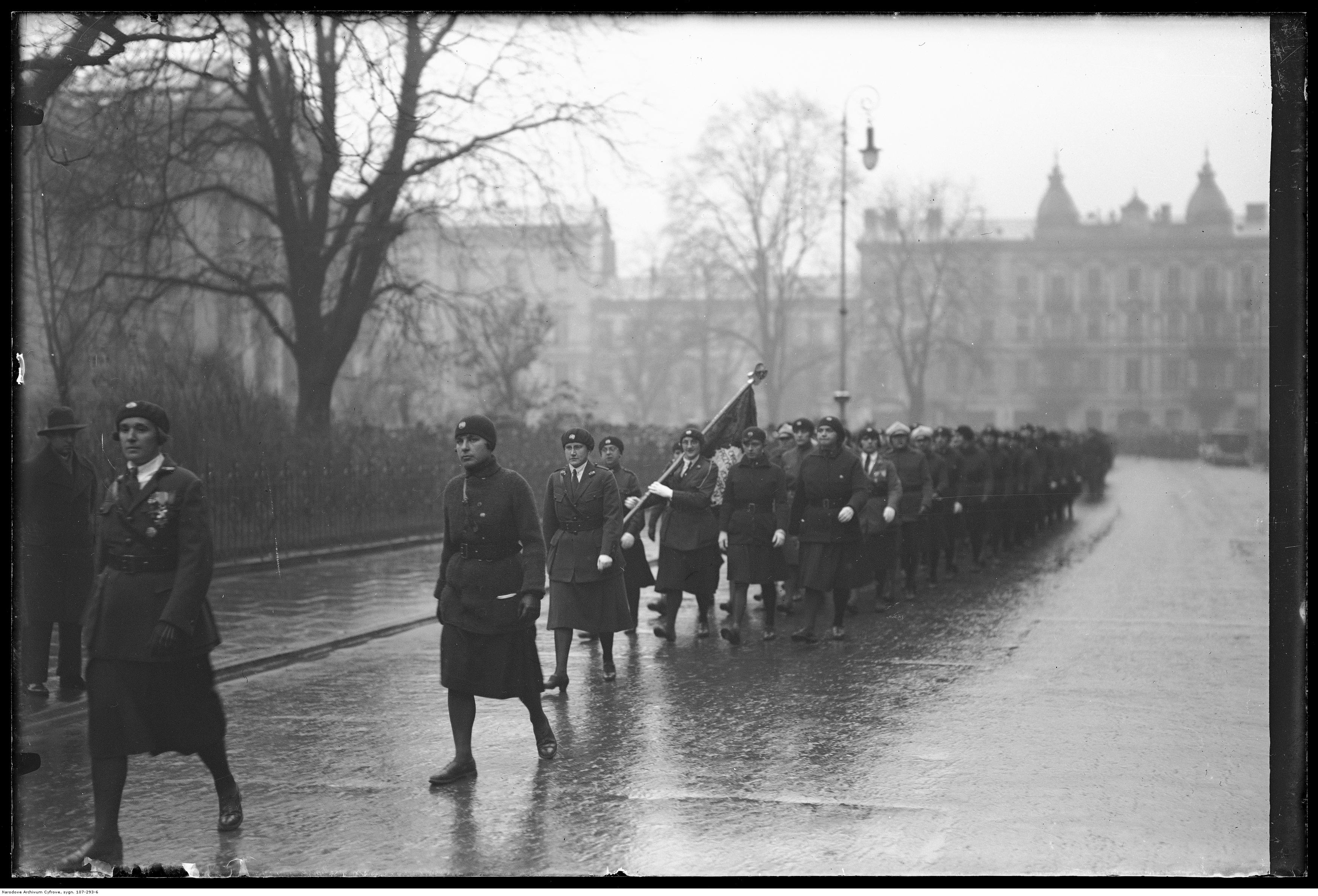 Defilada oddziału Przysposobienia Wojskowego Kobiet.